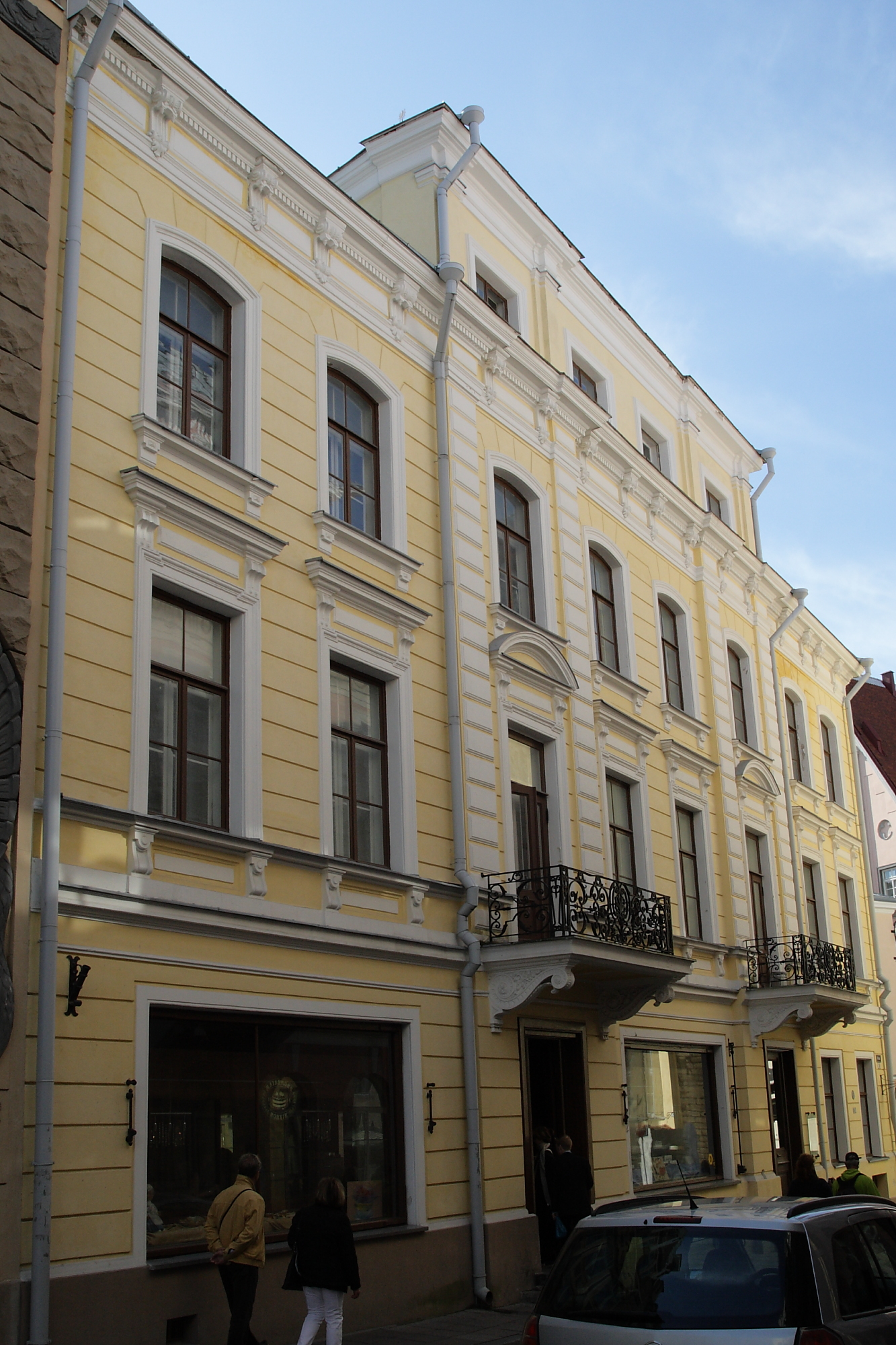 Tallinn, elamu fassaad ja historitsistlikud interjöörid Pikk 16-Pühavaimu 1, 1876